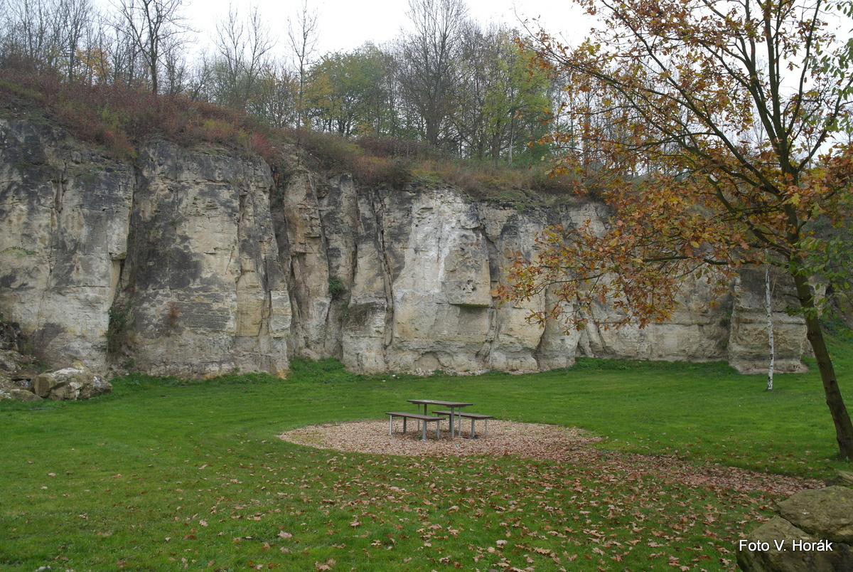 Skalní stěna u Pohořic (Martiněves). Je zde vybudované příjemné odpočívadlo u silnice na Budyni nad Ohří.